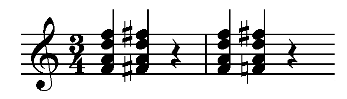 zenei módosítójelek - példa akkordikus használatra